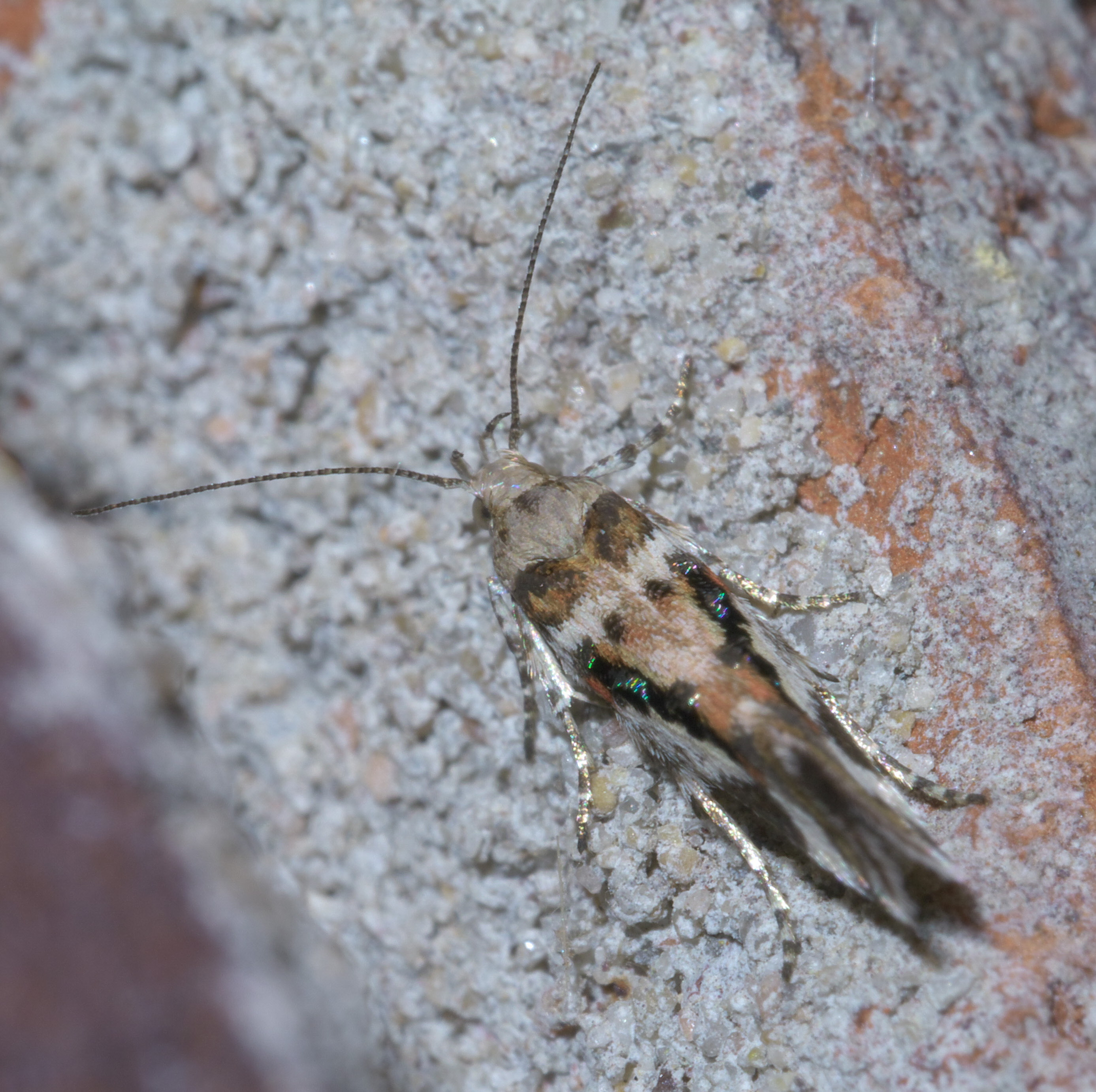 Aristotelia elegantella, elegant aristotelia moth, ID Confidence: 93